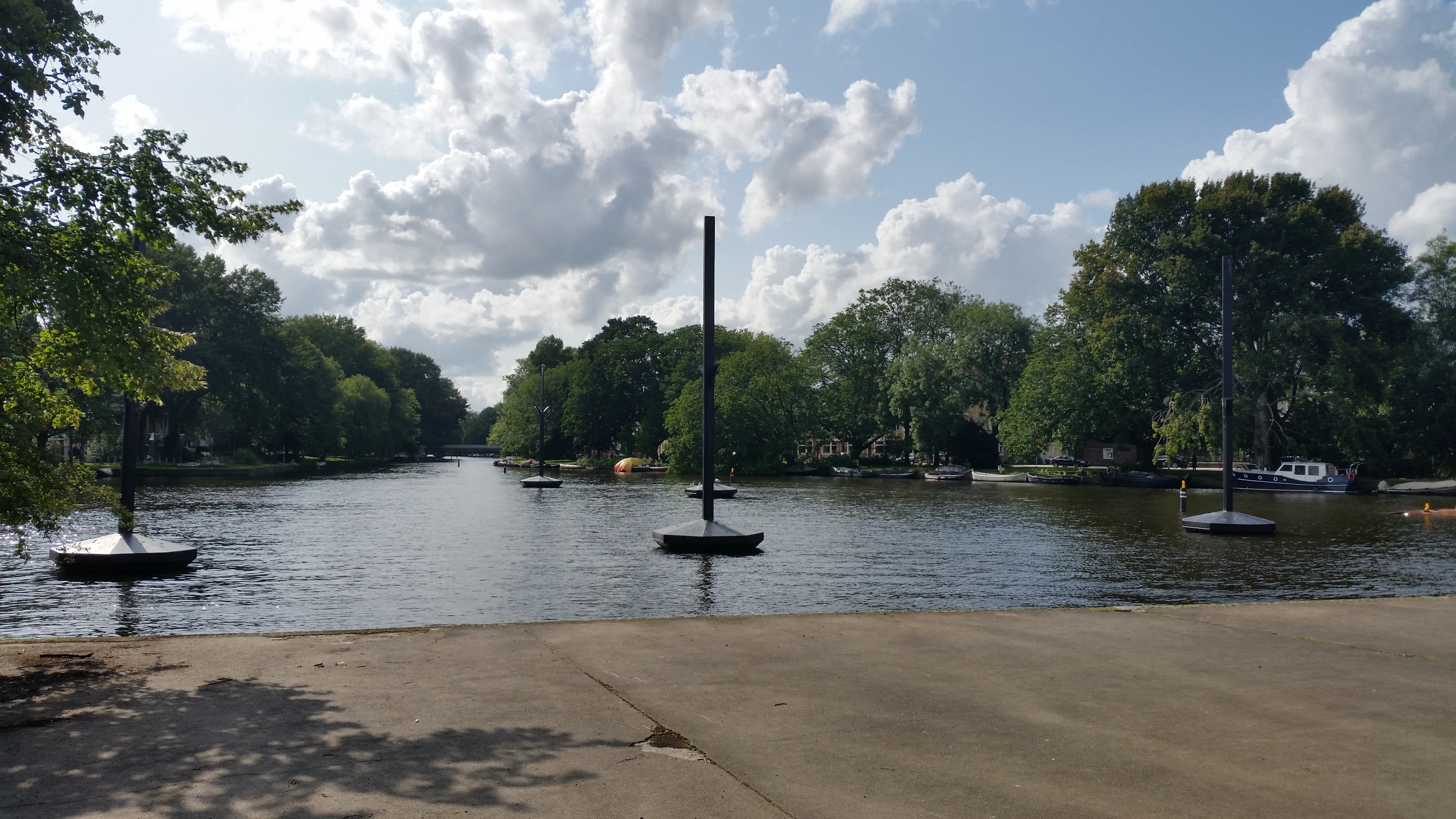 Drijvend plastiek